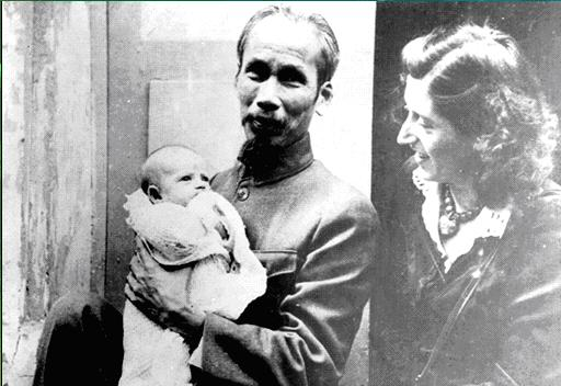 Ảnh chụp Hồ Chí Minh đang bế bé Elizabette Aubrac, con gái ông Raymond và bà Lucie Aubrac. Người bên phải Hồ Chí Minh là bà Lucie Aubrac.